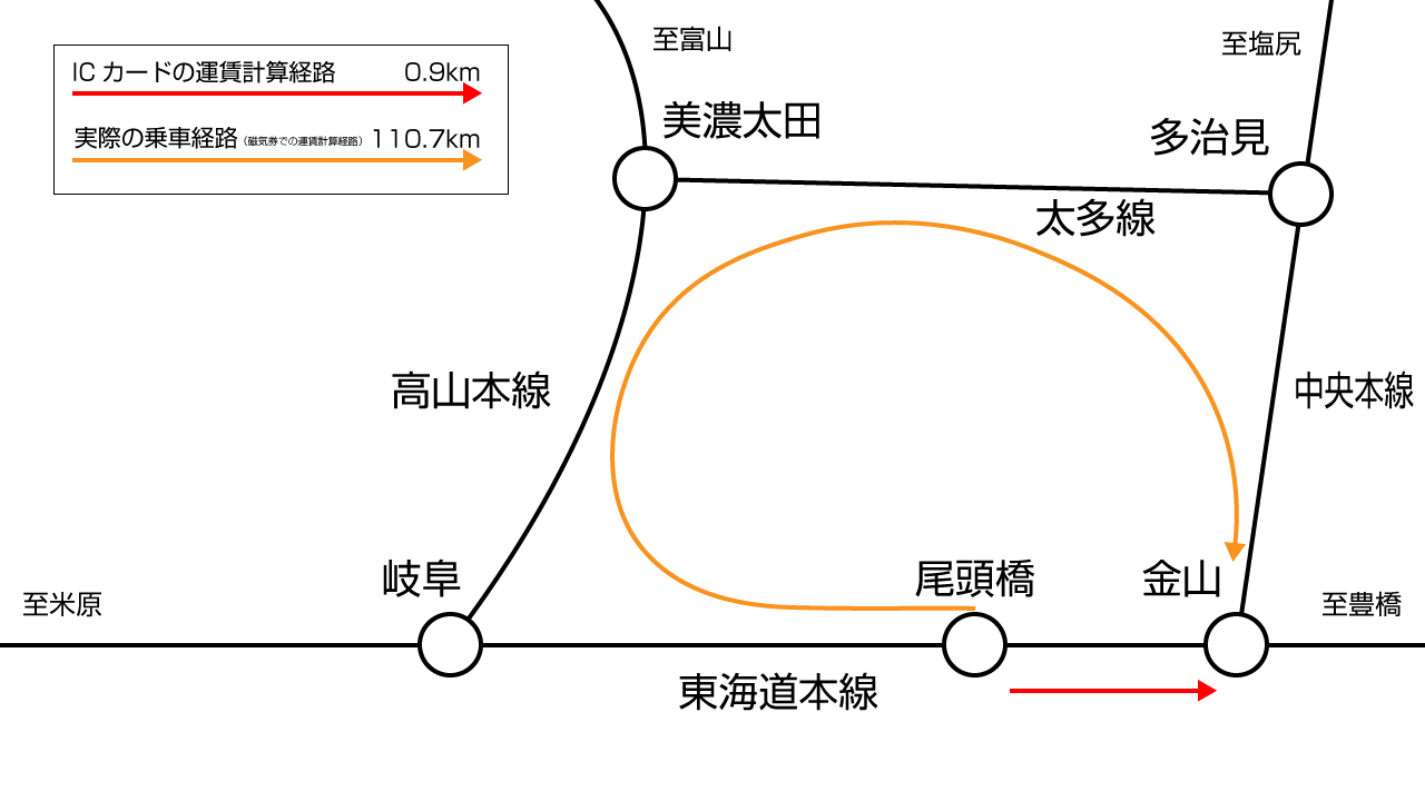 ToicaエリアでのIC乗車券を利用した大回り乗車の一例 磁気券では適用されないため注意